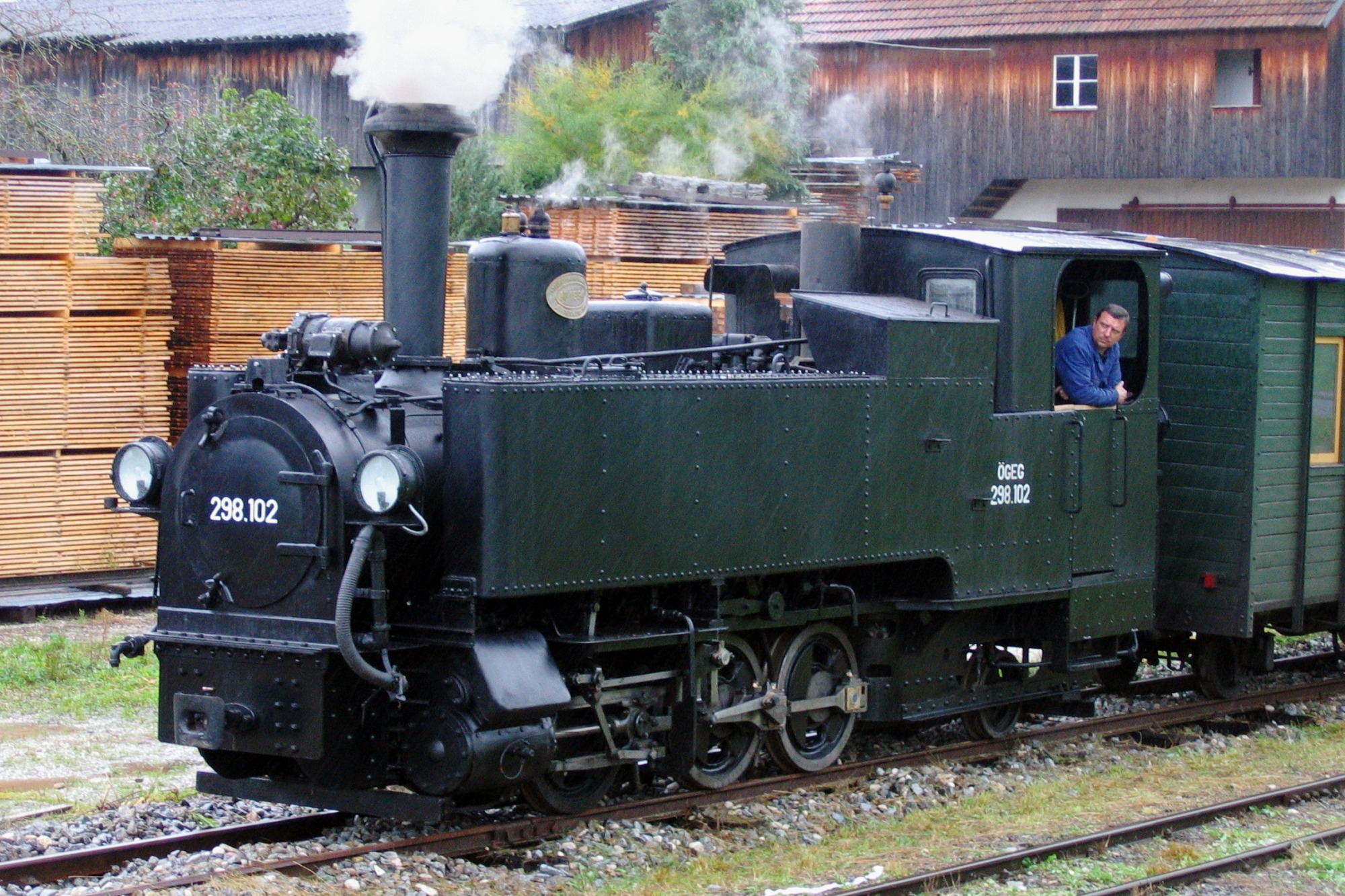 en: Former ÖBB 298.102 at Sommerhubermühle halt on the preserved Steyrtalbahn in Upper Austria. This ist the oldest steam locomotive on a 760 mm gauge in Austria, reintroduced to service in 2004. de: Ex ÖBB 298.102 in der Haltestelle Sommerhubermühle auf der Steyrtal-Museumsbahn in Oberösterreich. Diese Maschine ist die älteste Schmalspurdampflok mit einer Spurweite von 760 mm in Österreich. Sie wurde 2004 wieder in Betrieb genommen.